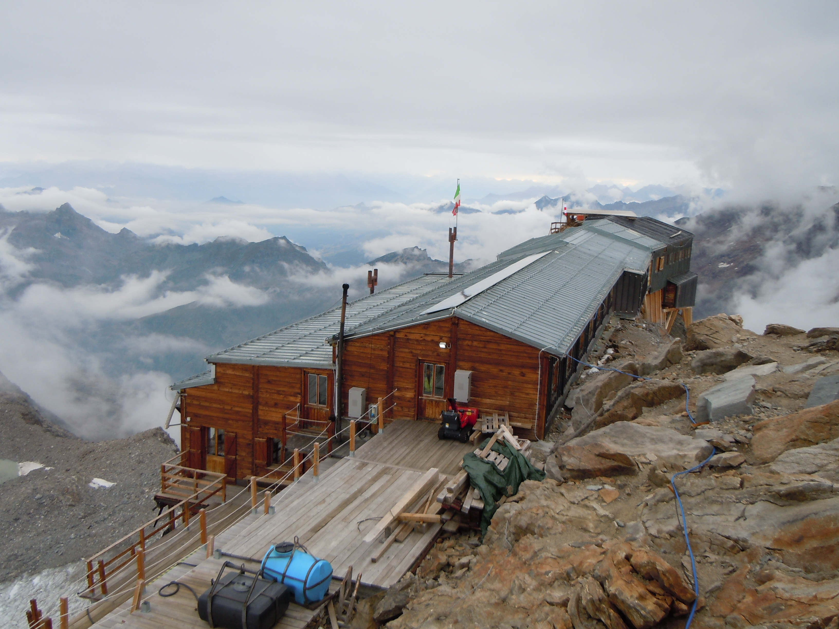 La Capanna Giovanni Gnifetti, 3647